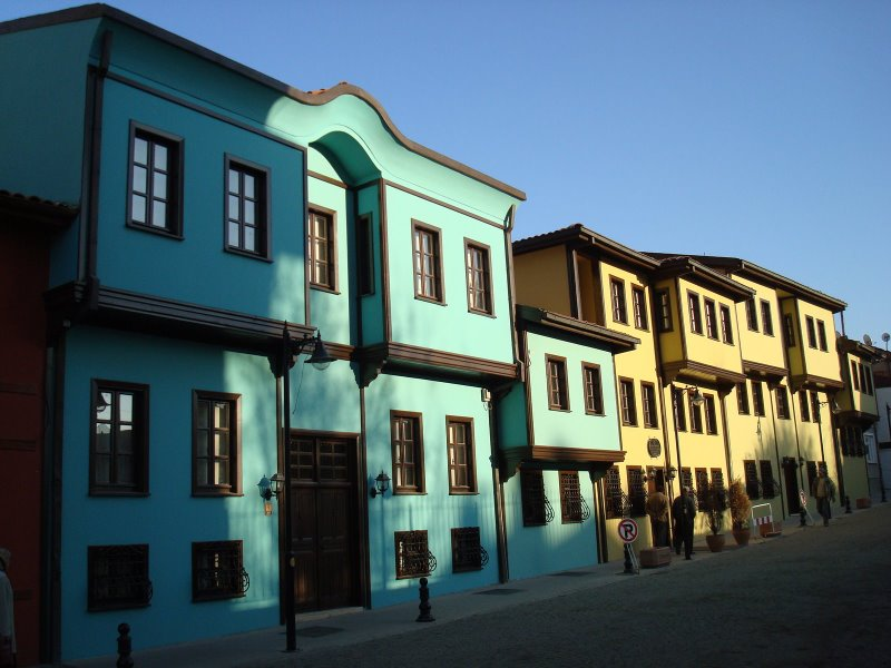 eskişehir odunpazarı evleri